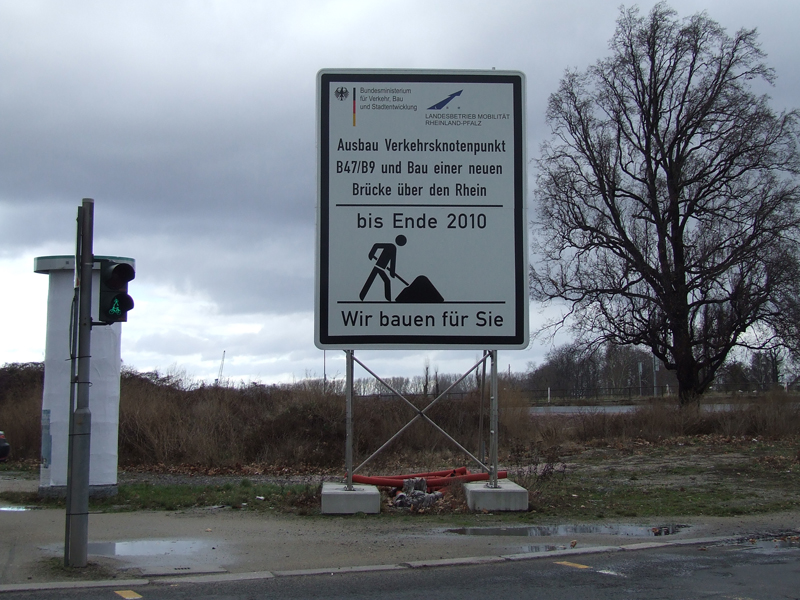 Hinweisschild an der Nibelungenbrücke (Worms): "Wir bauen für Sie: Ausbau Verkehrsknotenpunkt B47/B9 und Bau einer neuen Brücke über den Rhein - bis Ende 2010"